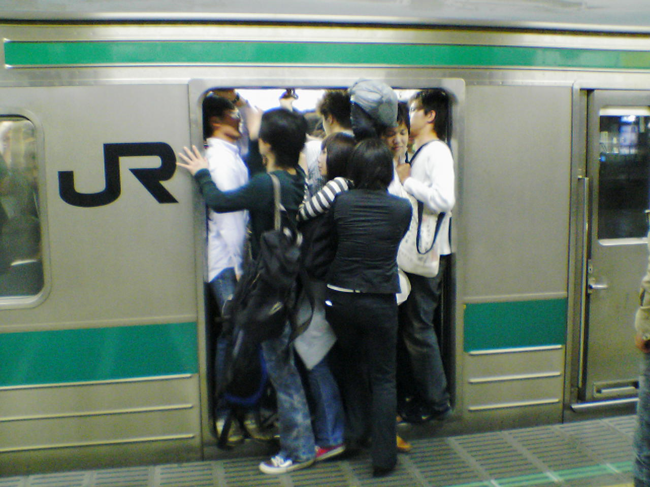 SA340114